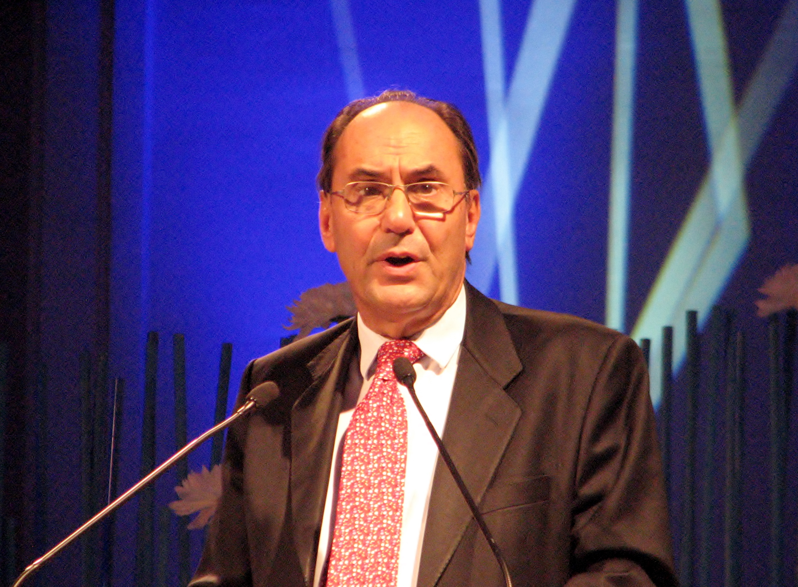 Alejo Vidal-Quadras esinemas Estonia kontserdisaalis konverentsil "ERSP 25 – milleks meile erakonnad?"